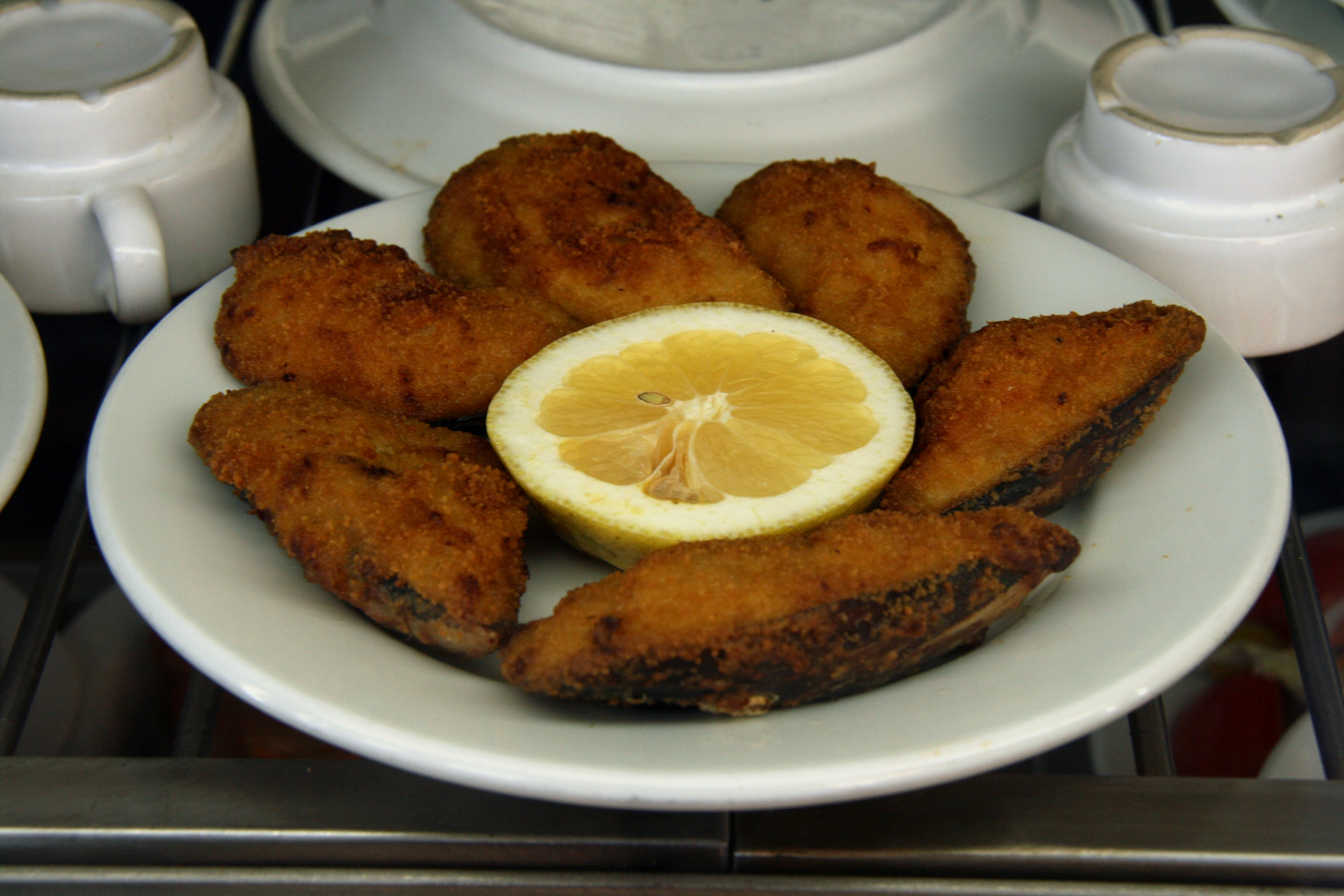 Mejillones rebozados